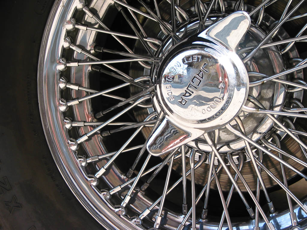 Jaguar E Typ, detail